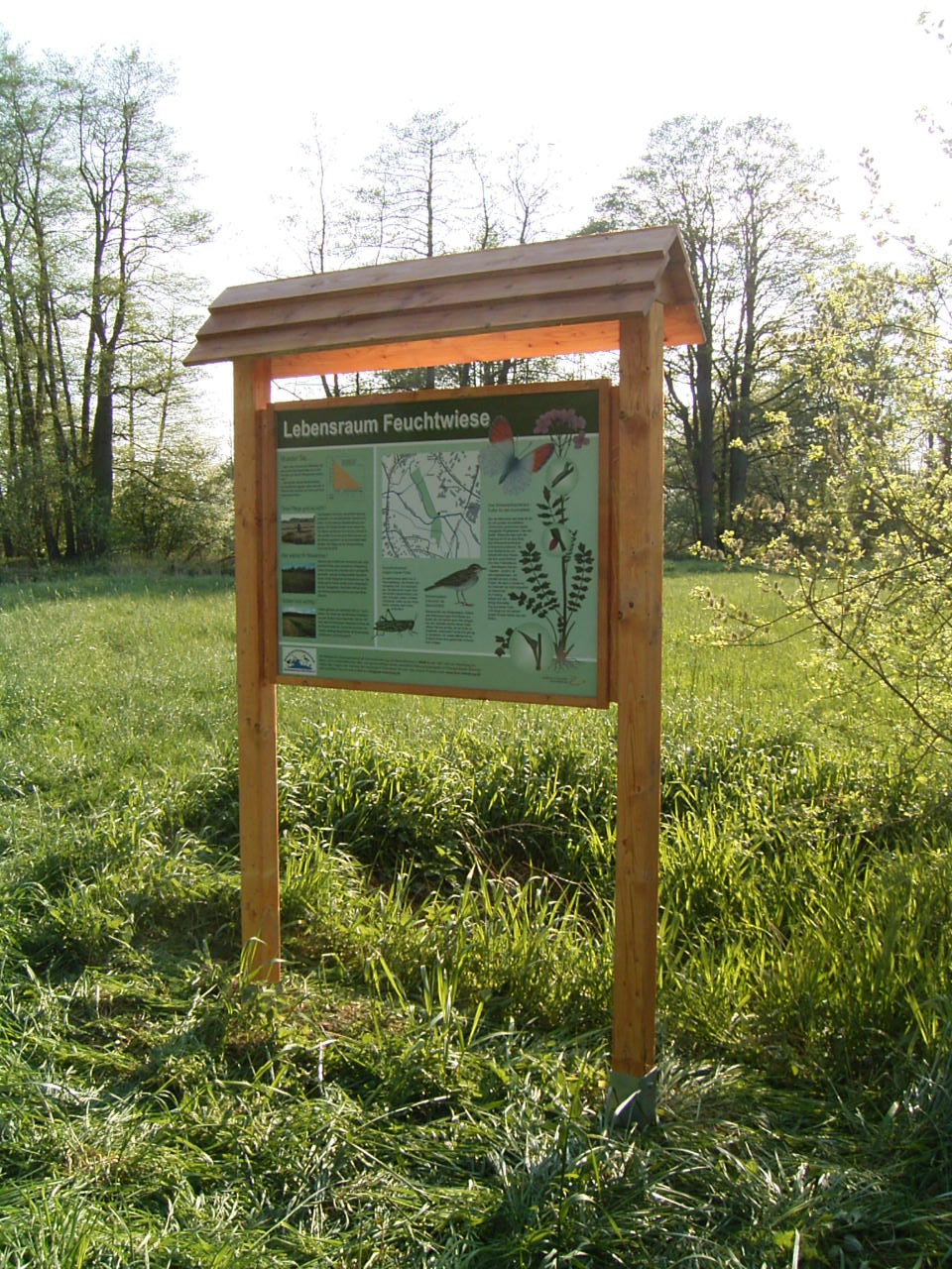 Informationstafel zum Lebensraum Feuchtwiese, hier in Rotenburg (Wümme), Nödenwiesen